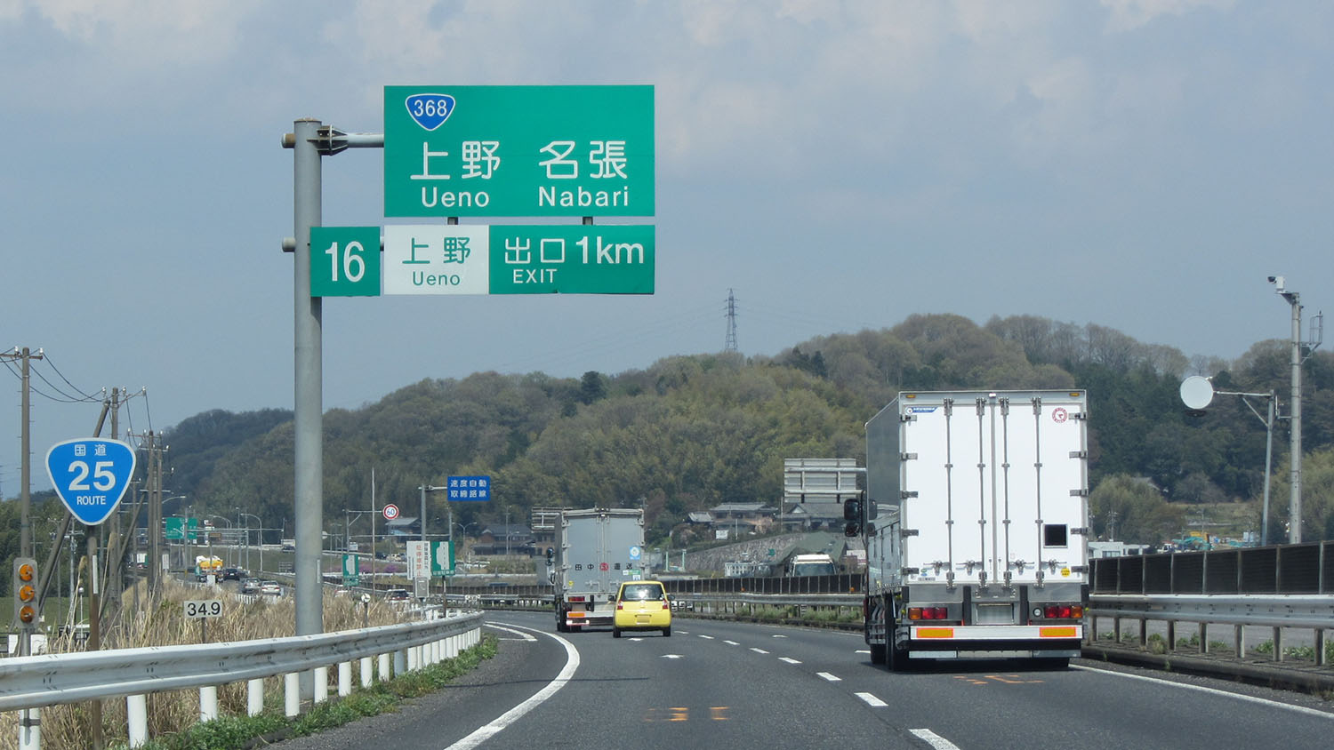 国道25号 名阪国道 上野インター付近